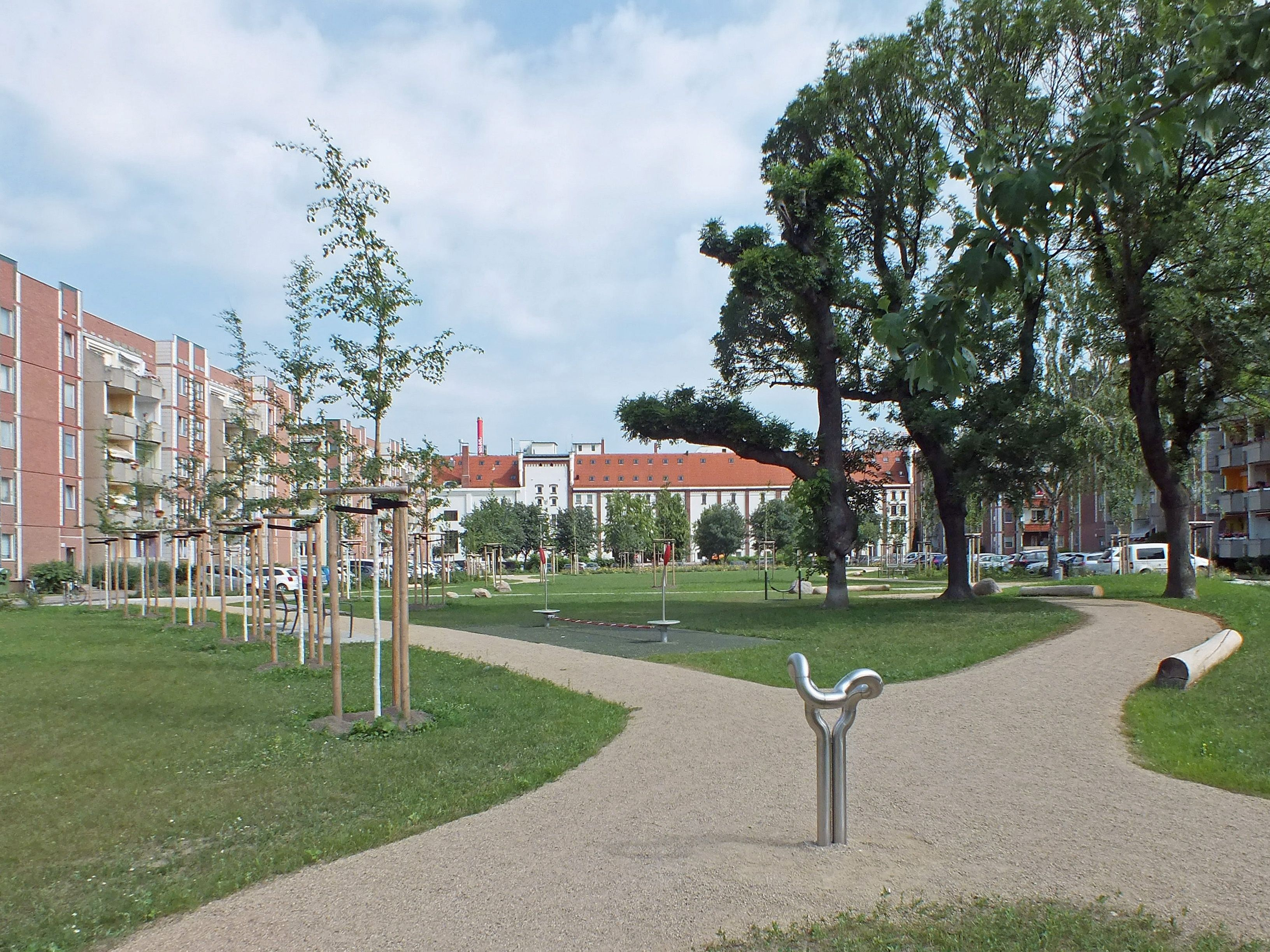 Cäcilenpark in Leipzig-Reudnitz, nach Norden